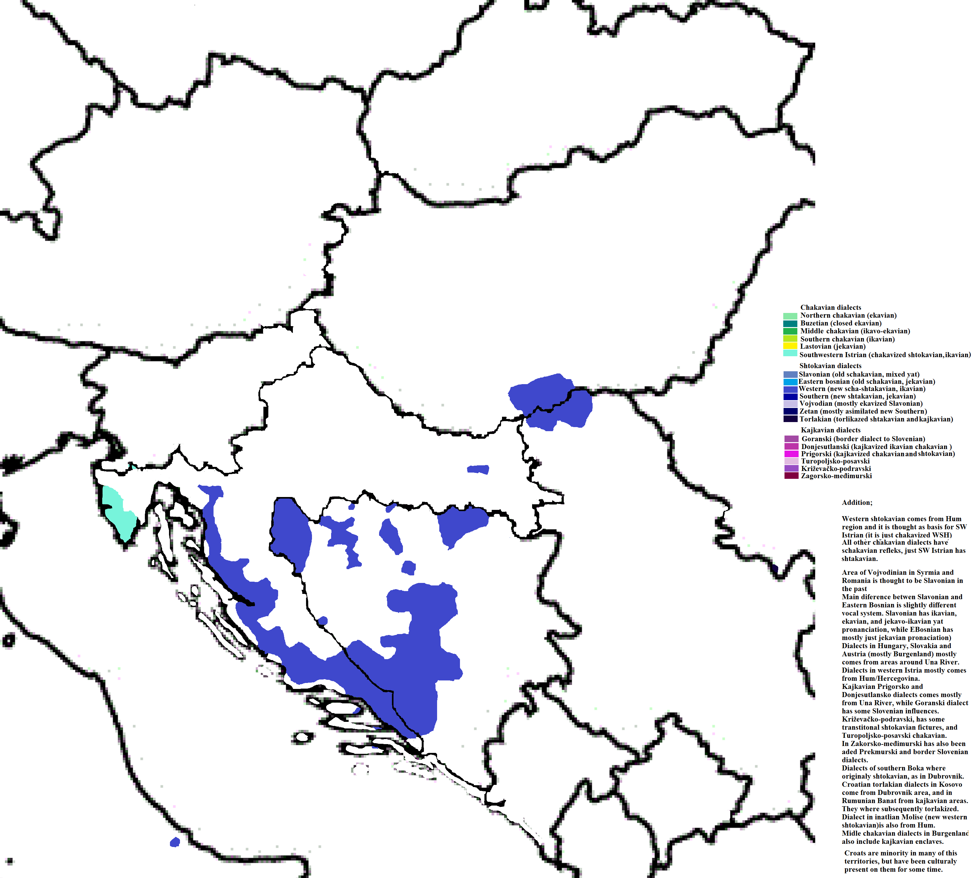 Novoštokavski ikavski i povezani dijalekti; čakavizirani jugozapadni istarski Vidljive su migracije; Bački koji je iz sjevera zapadne Hercegovine (oko Mostara) preko Like i Dalmatinske Zagore došao u Bačku Jugozapadno istarskog i moliškog koji su s juga zapadne Hercegovine i zagore oko Imotskog (zapadnohumski i cetinsko-podbiokovski) došli na JZ istre i u Molise Migracije novoštokaviziranih livanjsko-vrbaškog i SZ bosanskog po zapadnoj BiH